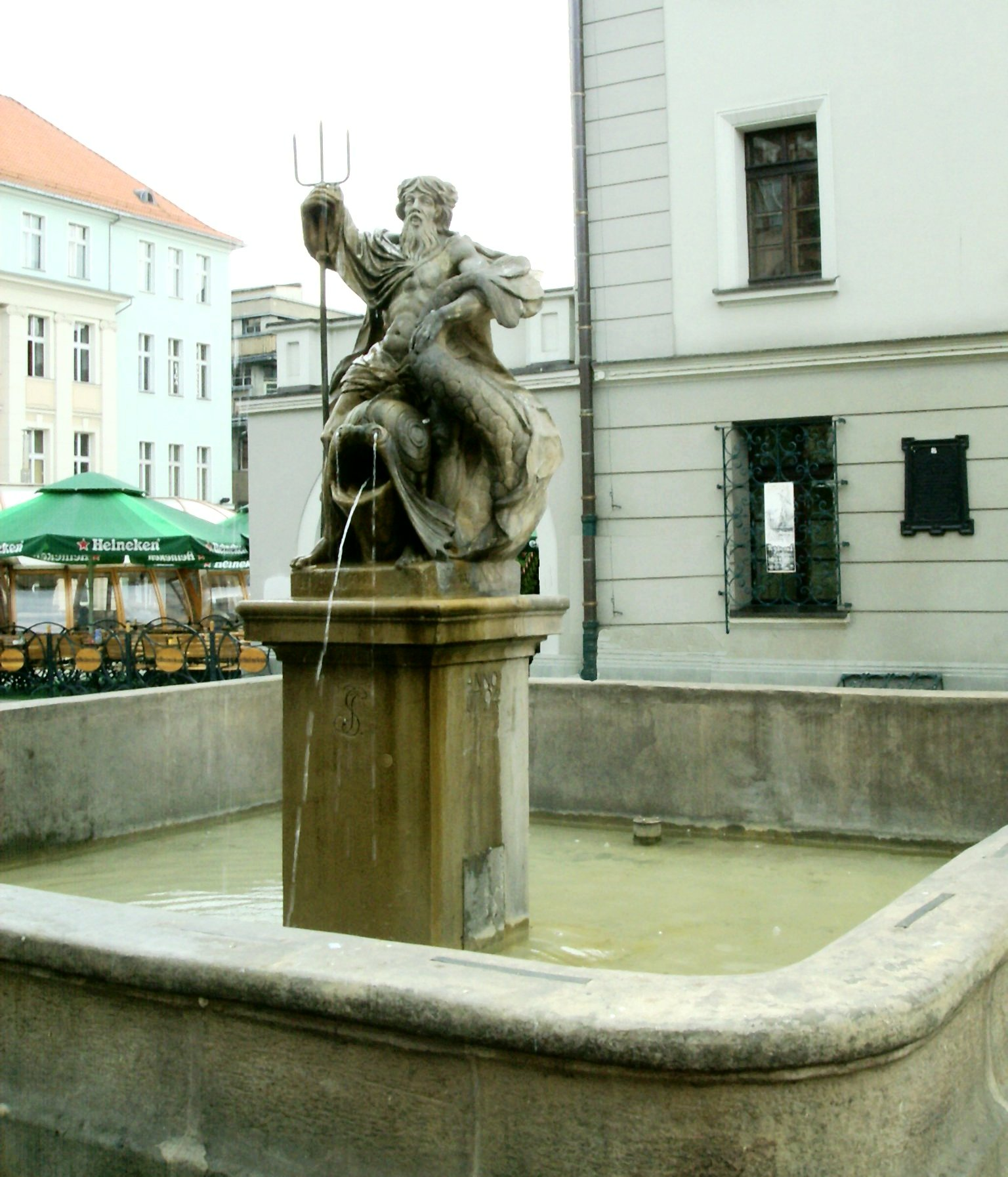 Gliwice - fontanna